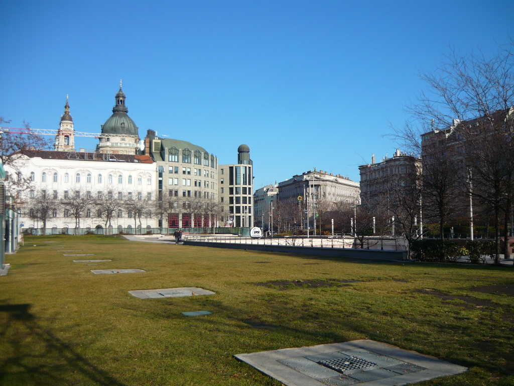 Northeast and mid-east part of Erzsébet Square, Budapest